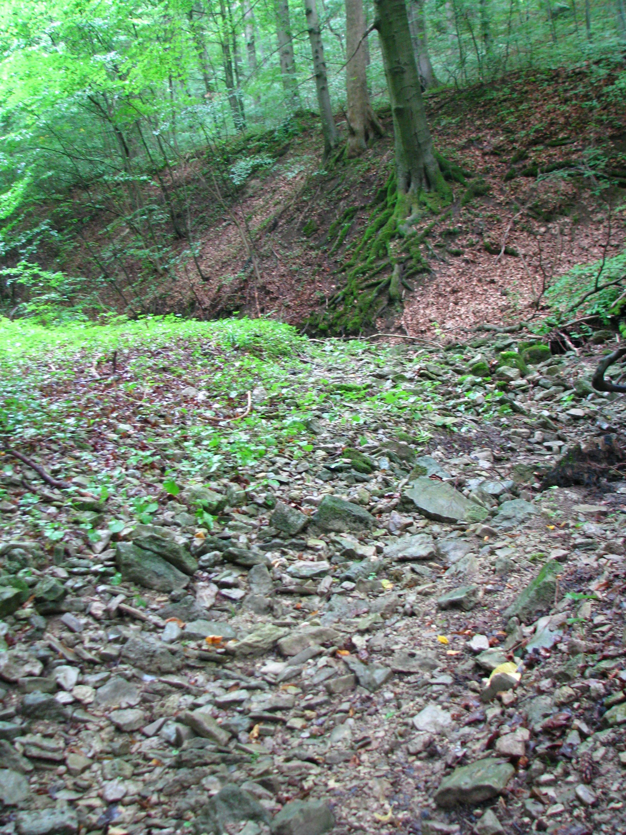 Großer Steingraben im Mühlhäuser Stadtwakd.